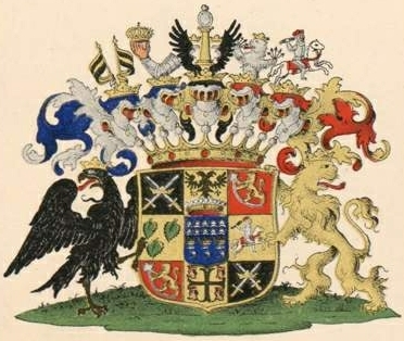 Rehbinderi suguvõsa krahvivapp